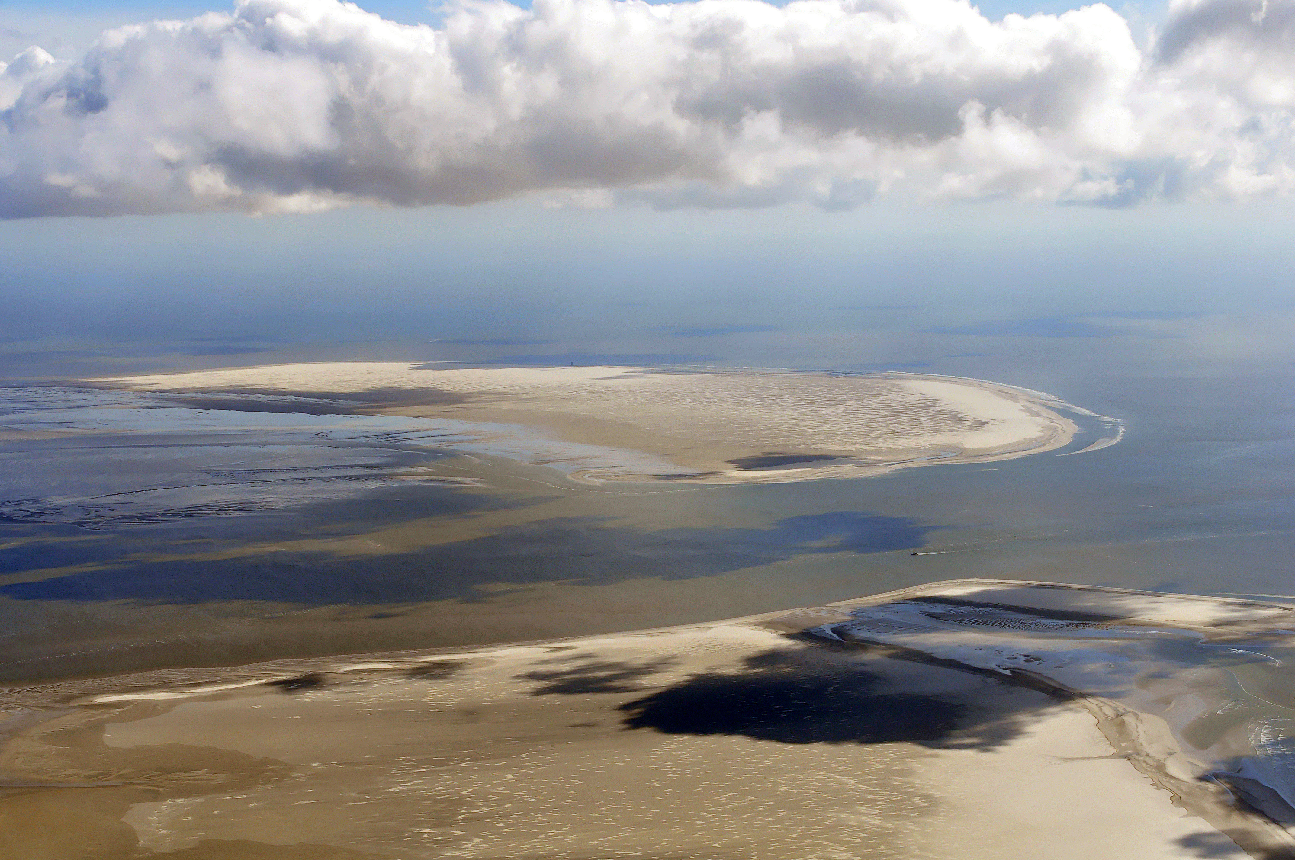 Luftbilder von der Nordseeküste 2012-05. Die Sandbank Norderoogsand.